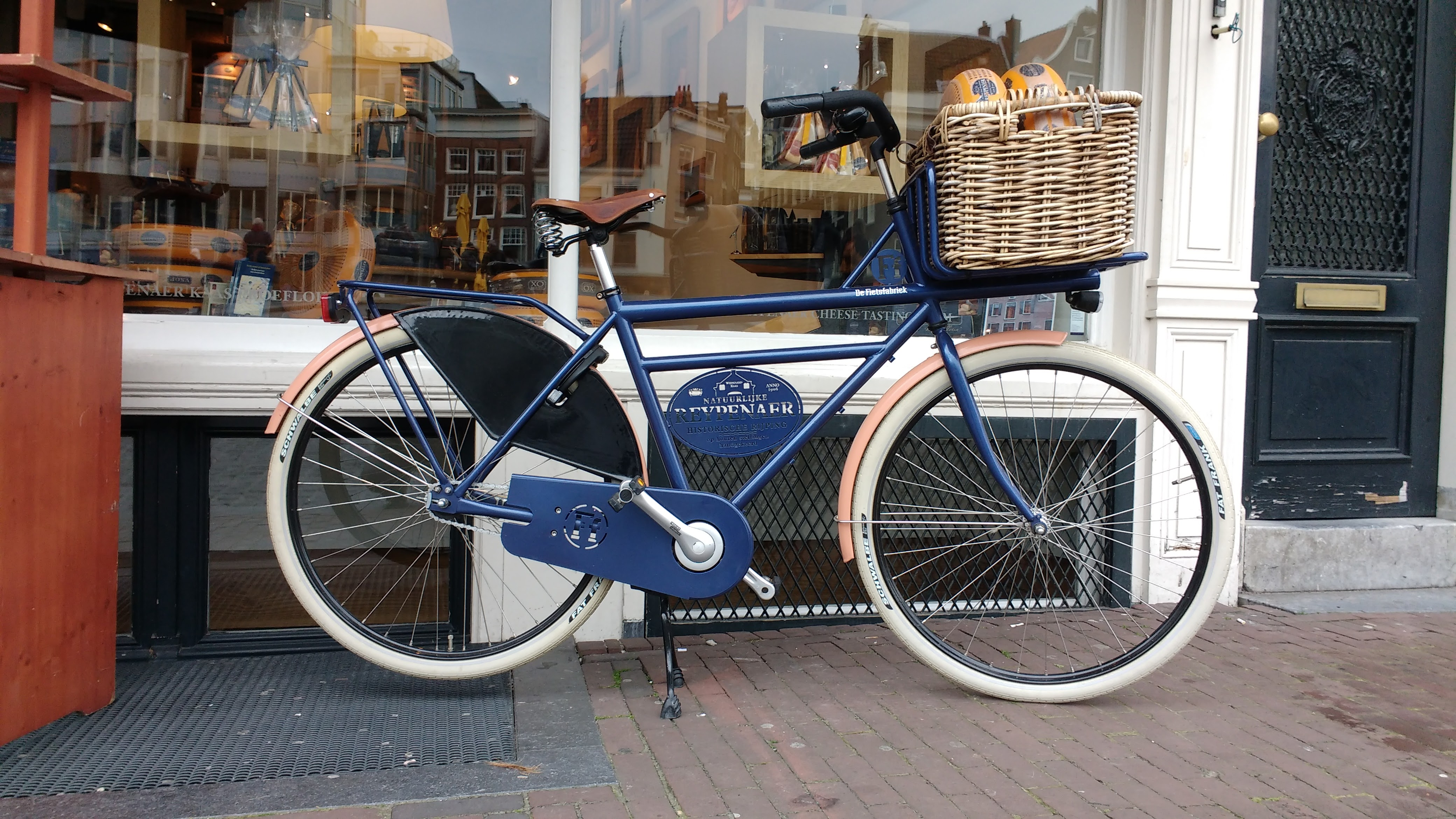 Reypenaer Museum, Amsterdam